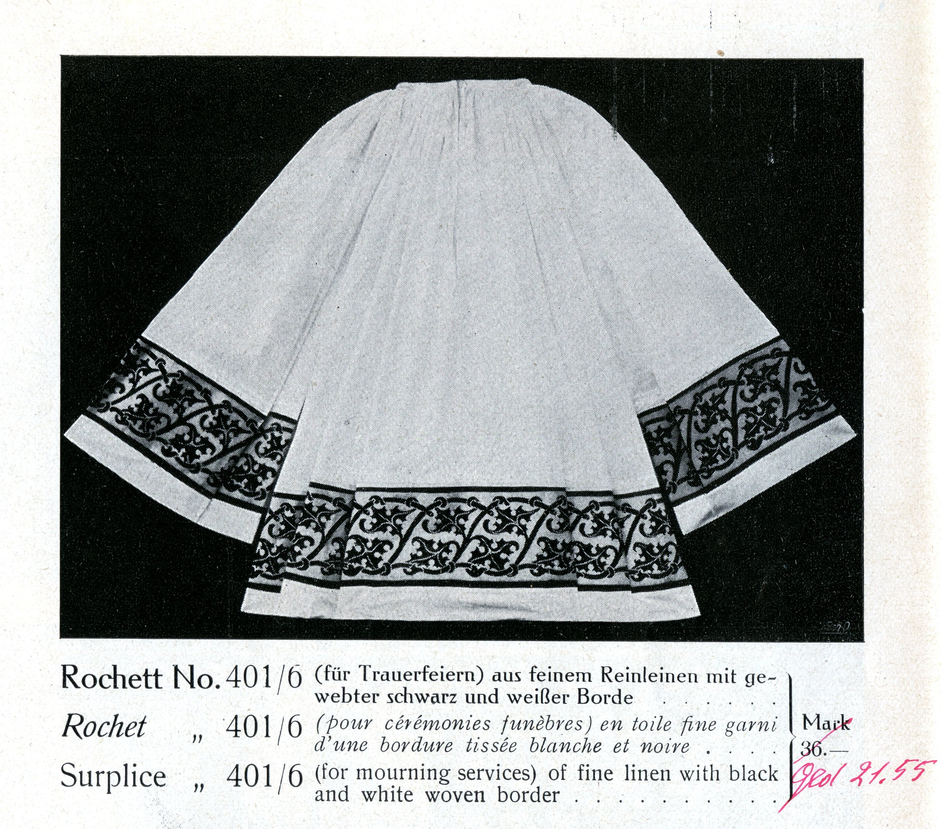 Superplie